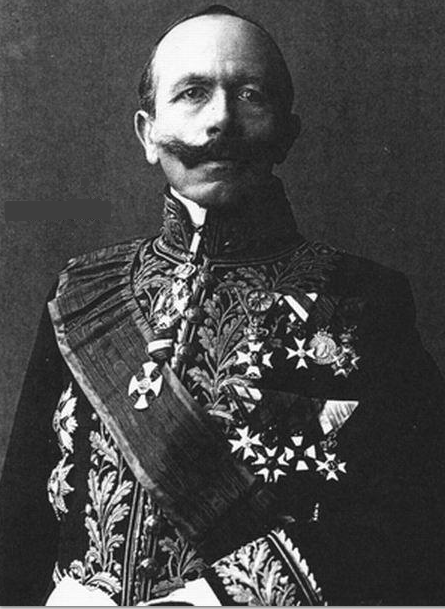 Gouverneur de la Province de Liège (Belgique) de 1908 à 1919